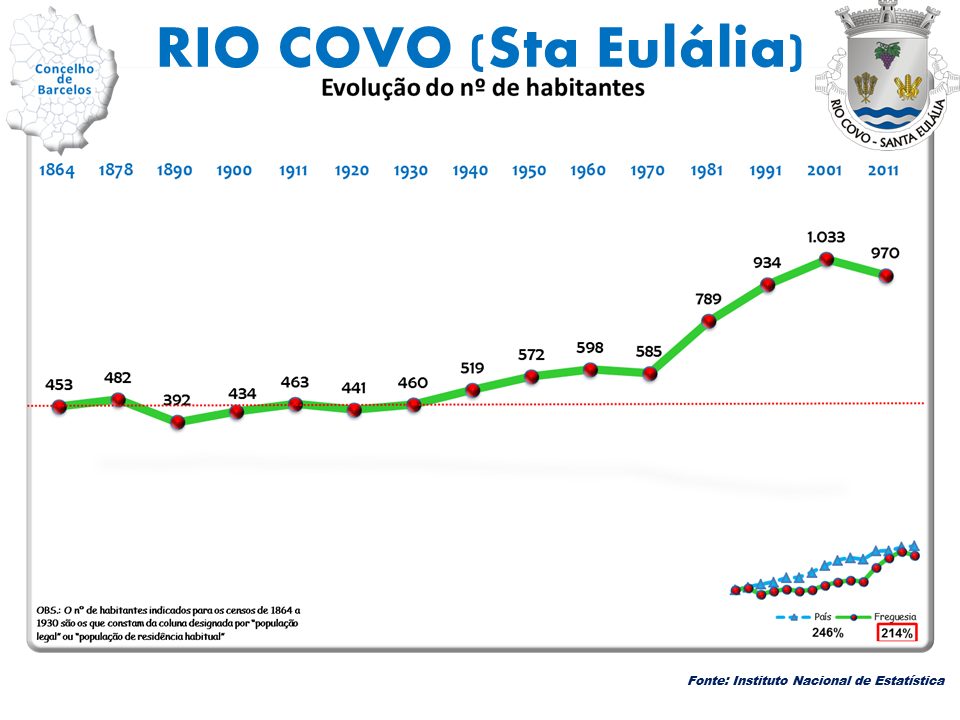 Censos 1864/2011